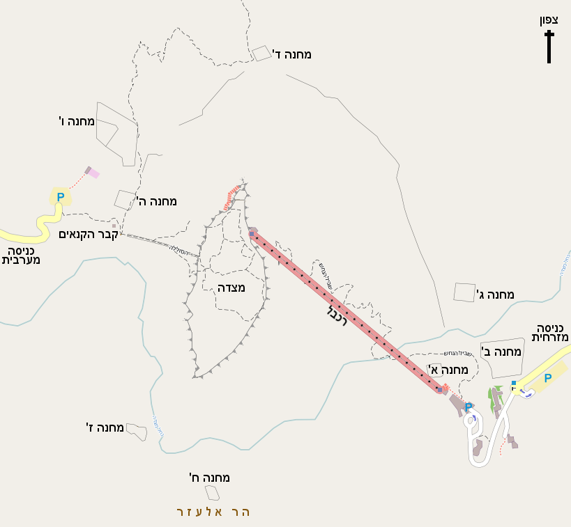 Masada and around